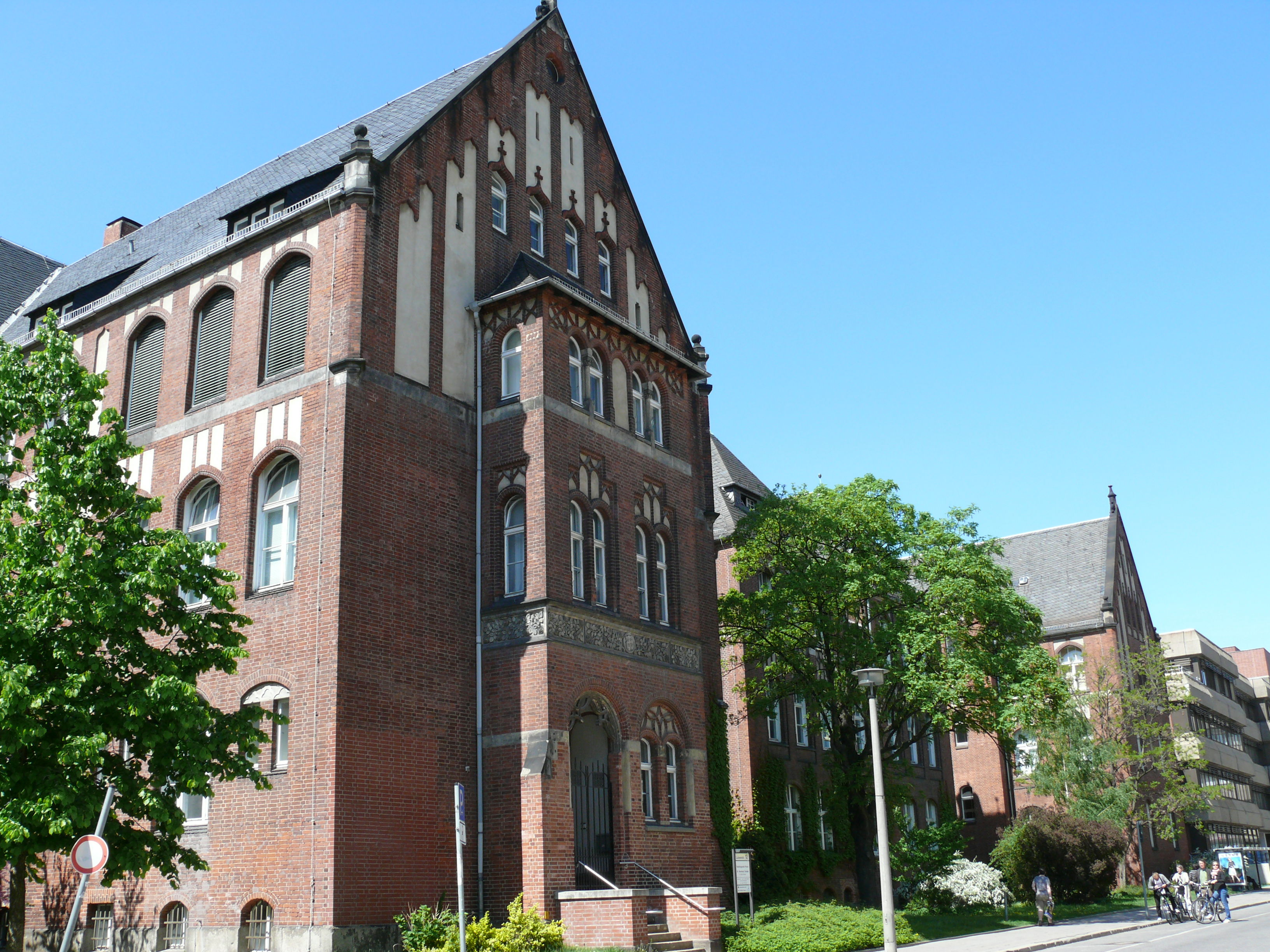 Berlin-Mitte Luisenstraße